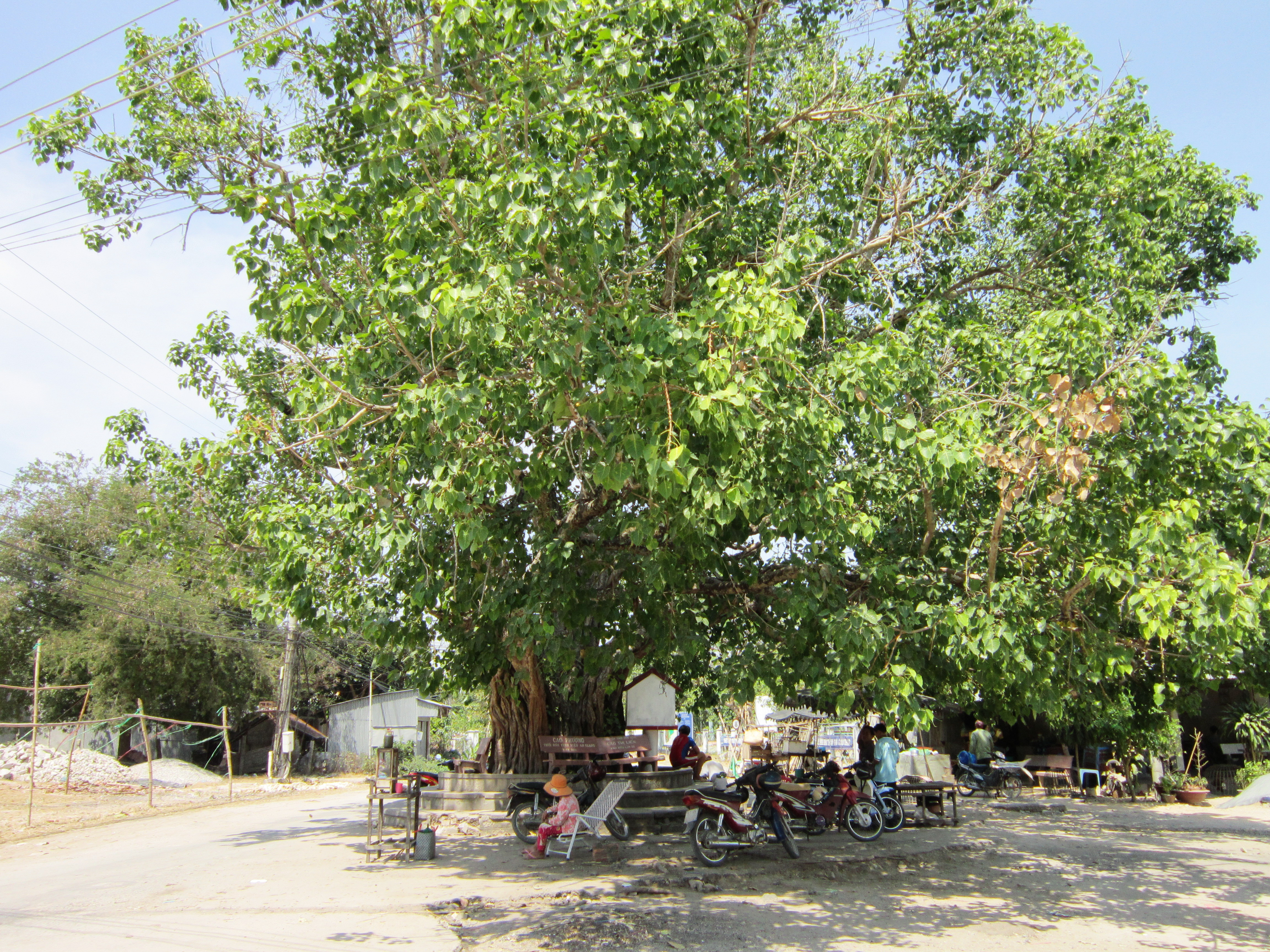 Cây Lâm vồ (thuộc họ Dâu tằm, Moraceae) to lớn ở trước cổng chùa Thới Sơn (Tịnh Biên, An Giang, Việt Nam). Tương truyền, cây này do Phật Thầy Tây An trồng khi xưa, tức ở giữa thế kỷ 19.